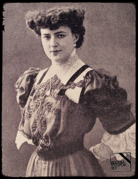 Грибова Ольга